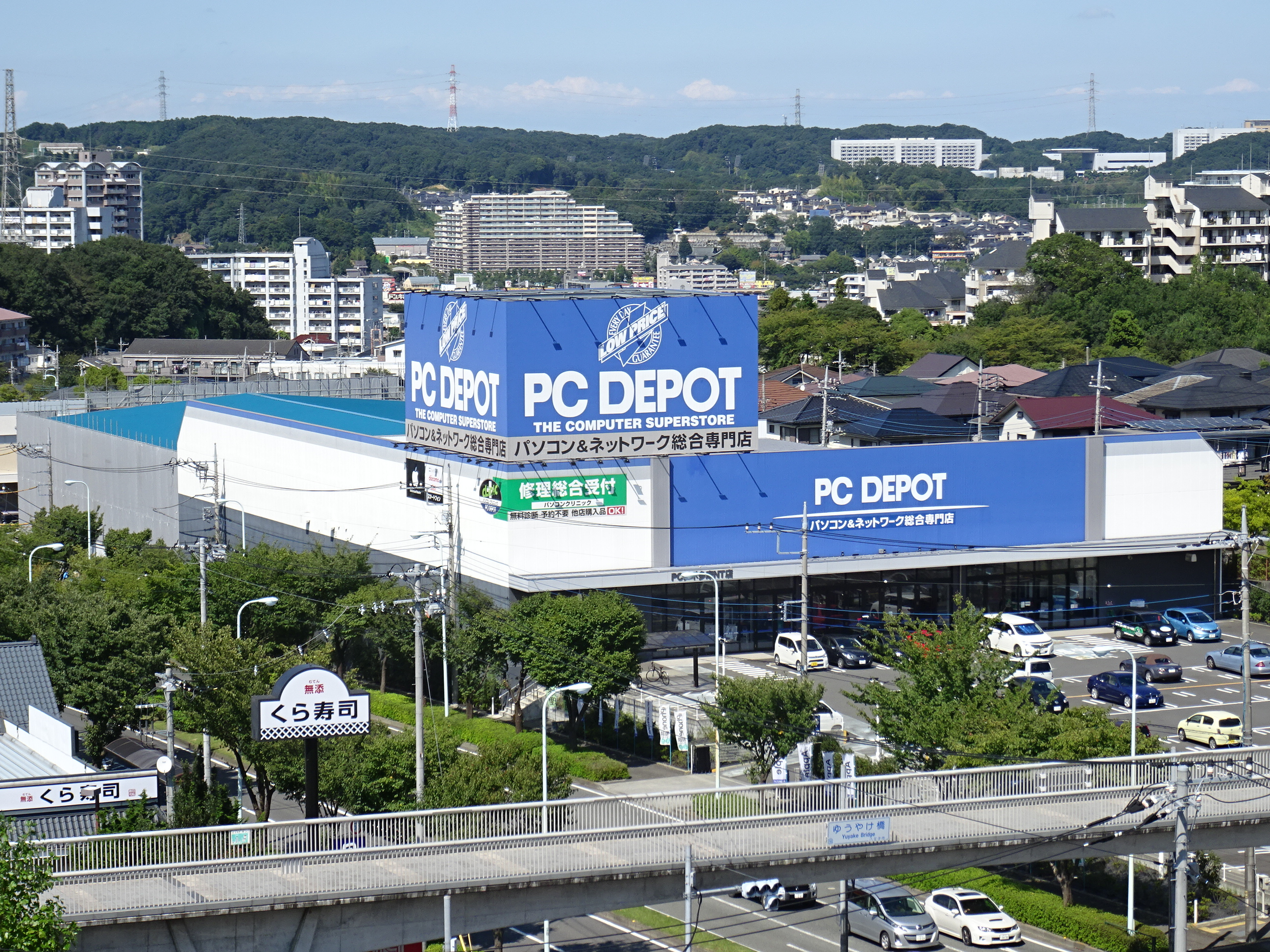 PCデポ多摩ニュータウン店（2015/09/20撮影）